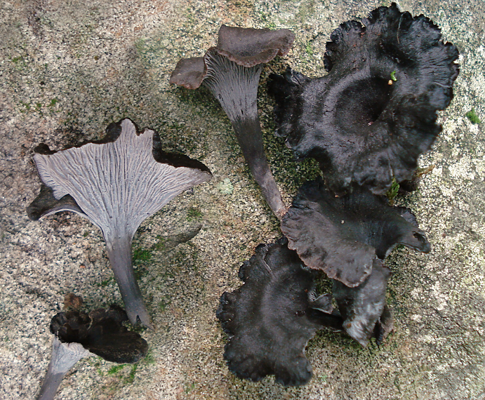 Craterellus cinereus (Pers.) Quél.